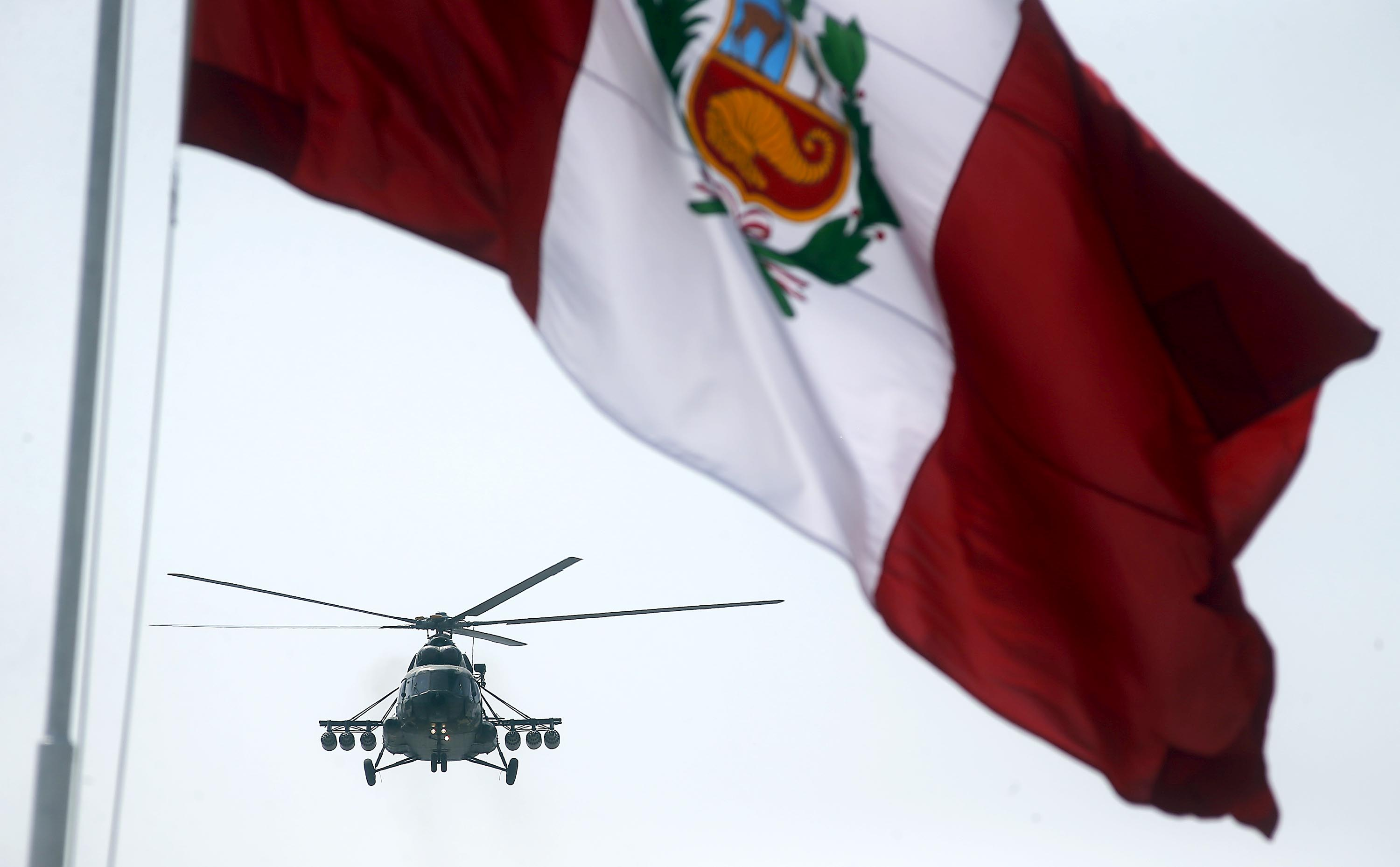 Ceremonia por el 190° Aniversario de la Batalla de Ayacucho y día del Ejército del Perú